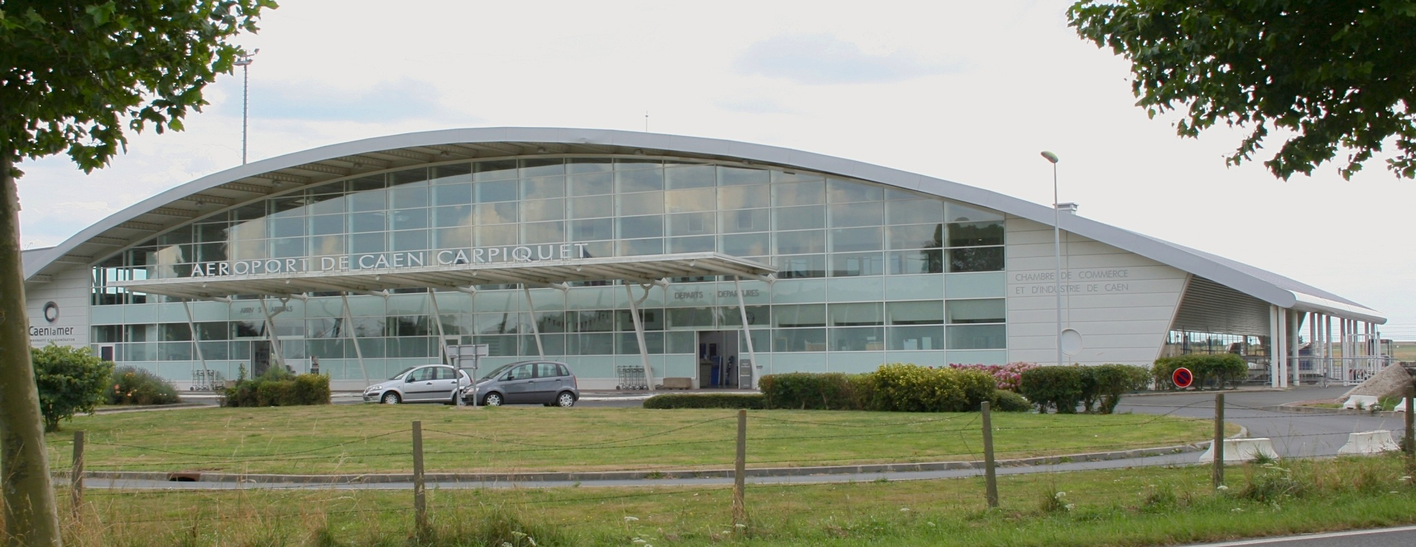 Façade de l'aérogare de Caen-Carpiquet - France